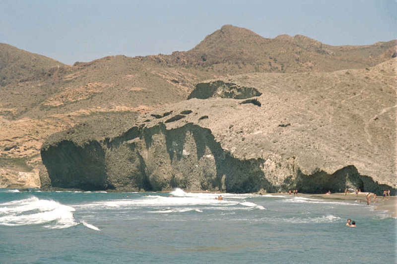 Playa de Mónsul en el Parque Natural de Cabo de Gata en la provincia de Almería (España). Coladas de lava en contacto con el mar. Playa de Mónsul in the Cabo de Gata Natural Park in Almería province (Spain).